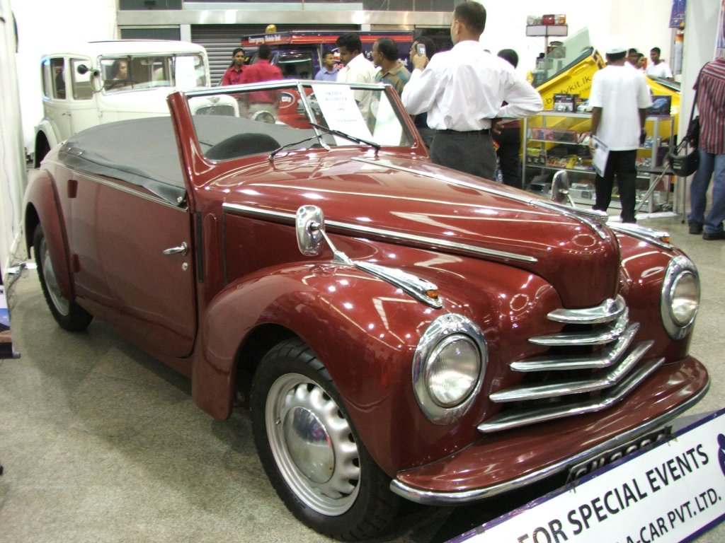 Škoda 1102 "Tudor" roadster (1950)